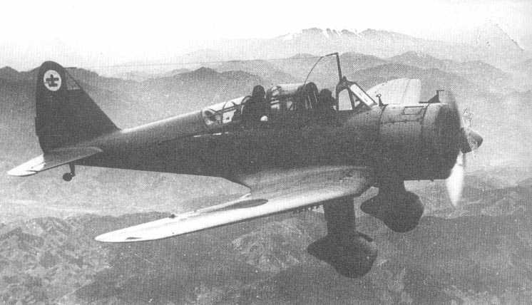 九八式直接協同偵察機は、日本陸軍の偵察機。試作名称はキ36。連合軍のコードネームはIda（アイーダ）。開発は立川飛行機。派生形に九九式高等練習機(キ55)がある。この画像は陸軍航空士官学校所属の九九式高等練習機。